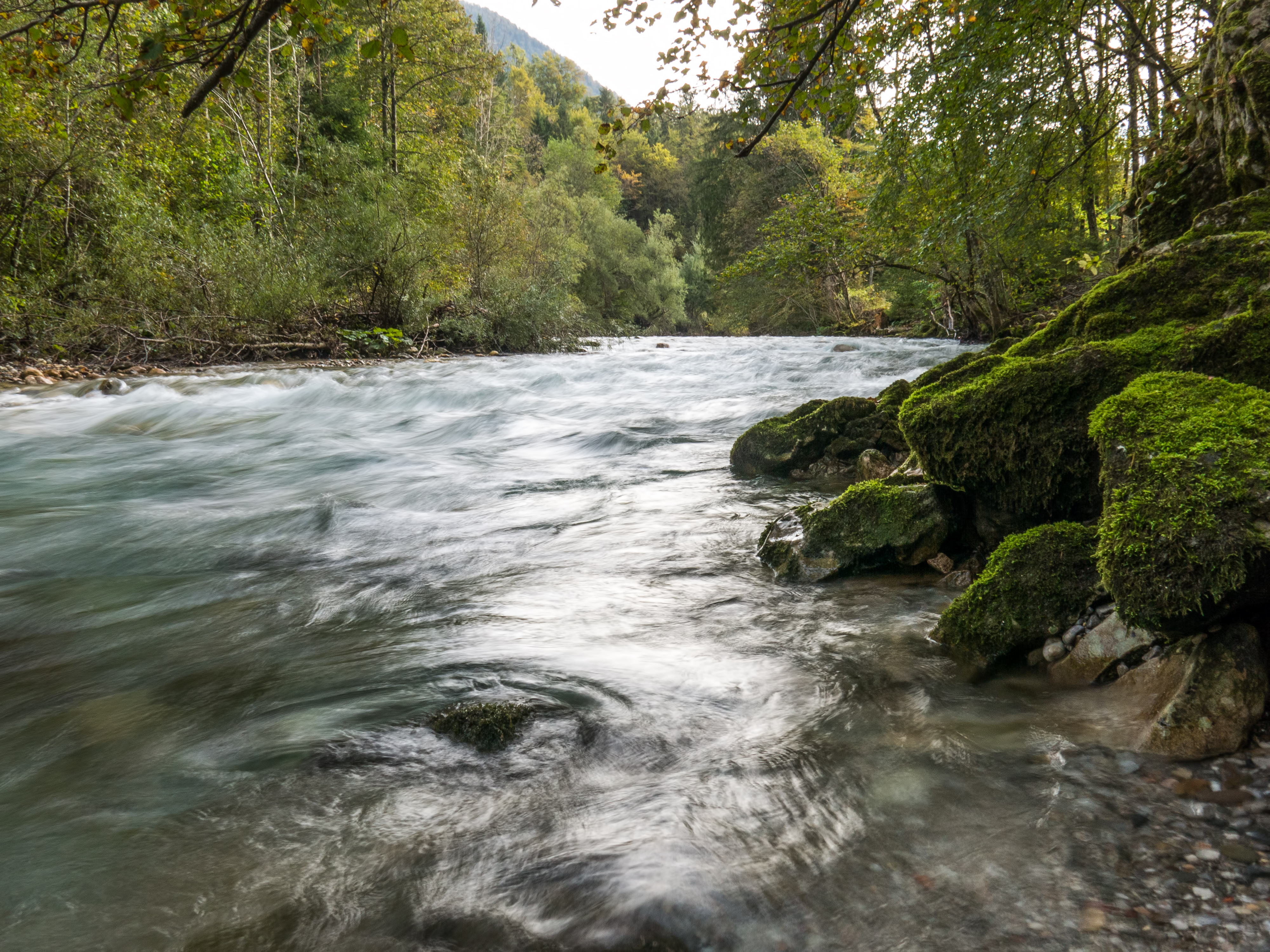 Reka Kokra